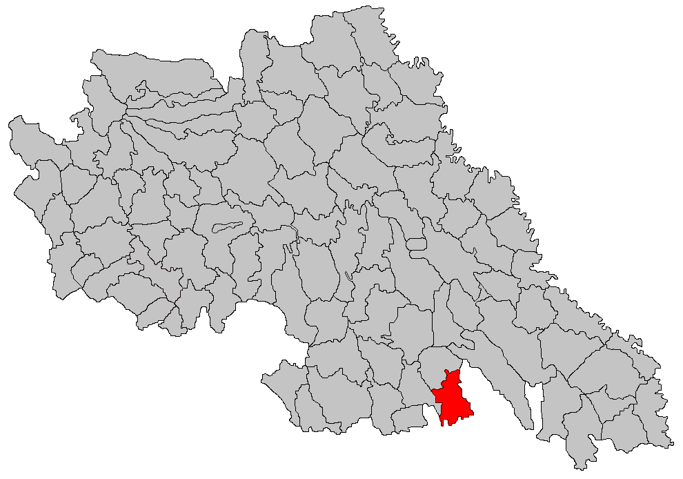 Categorie:Hărţi ale judeţului Iaşi